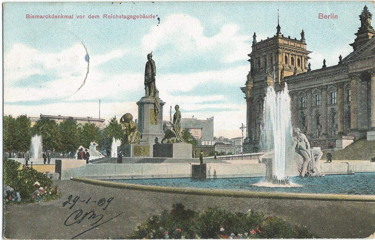 Vue de Berlin au début du XXe siècle (carte postale).